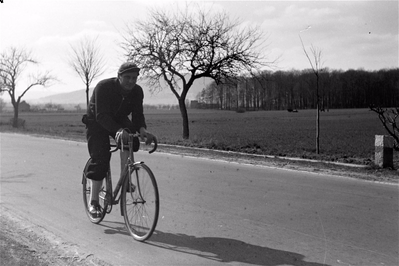 Diese 1950 datierte Aufnahme aus dem Nachlass des Fotografen Dierssen zeigt den Radrennfahrer Heinrich Schwarzer auf einer zum Zeitpunkt des Hochladens noch nicht identifizierten Landstraße. Das Digitalisat wurde am 27. Juni 2017 erstmals vom Bildarchiv der Region Hannover (Signatur ARH NL Dierssen 1010/0020) der Öffentlichkeit in "Bildschirmqualität" zur Verfügung gestellt mit der Lizenz CC BY-SA 3.0 ...